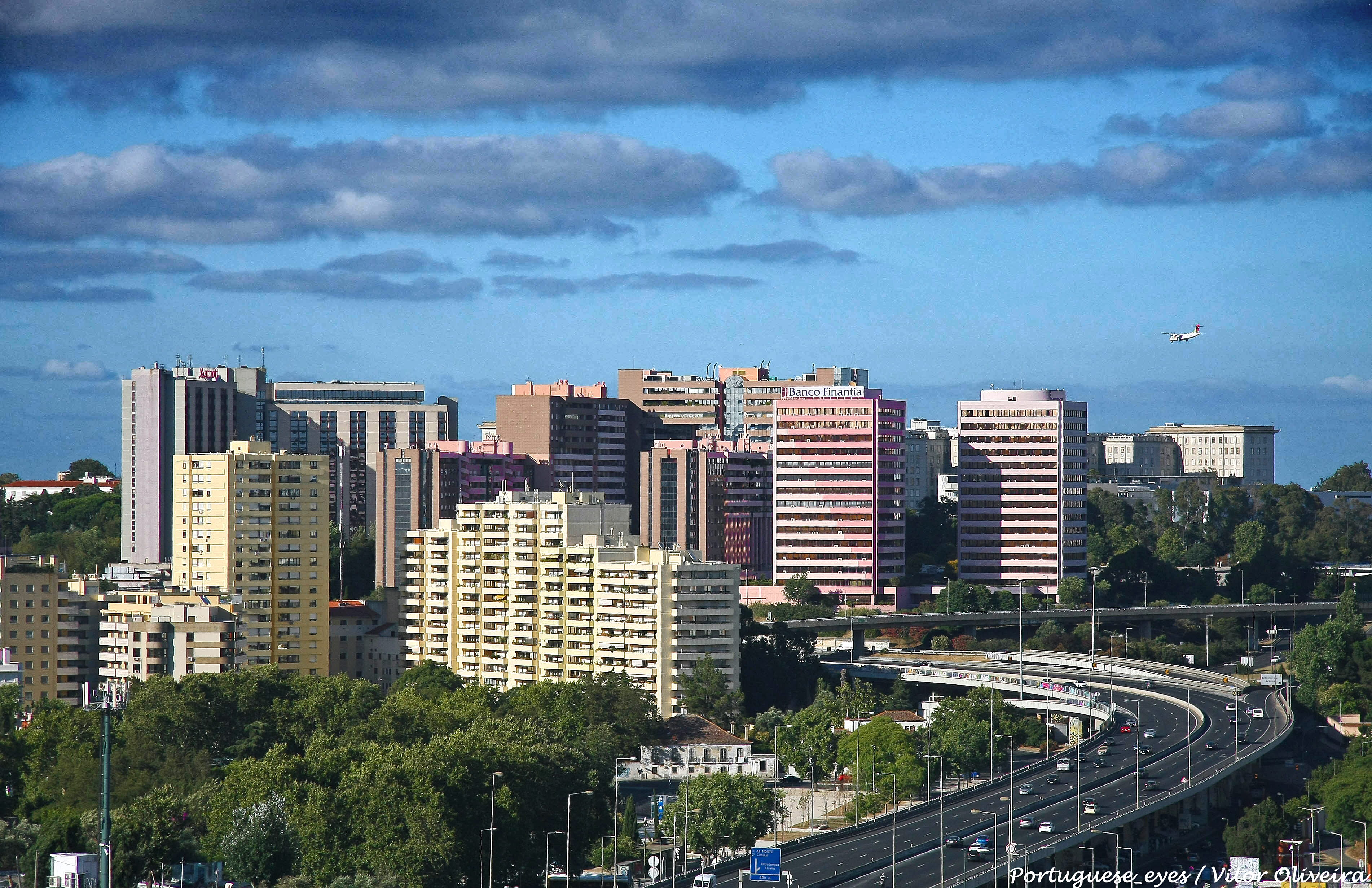 Lisboa - Portugal 🇵🇹